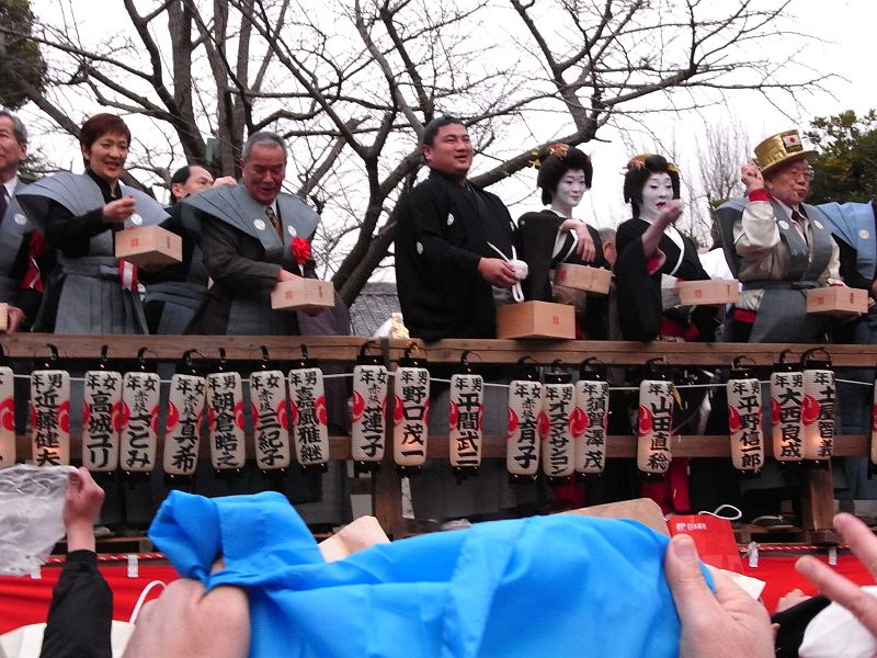 大相撲 嘉風雅継